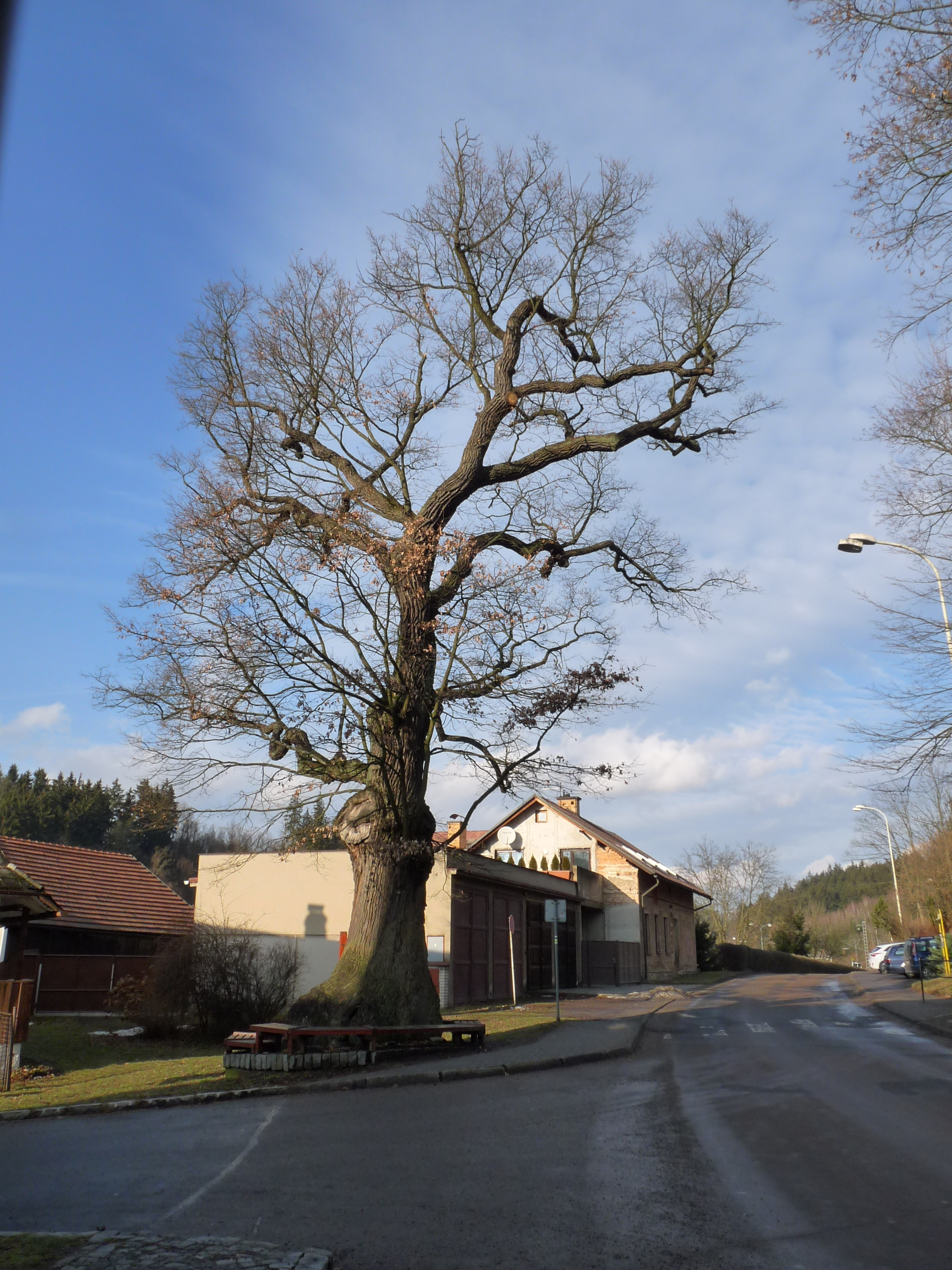 Jablonné nad Orlicí,památný dub